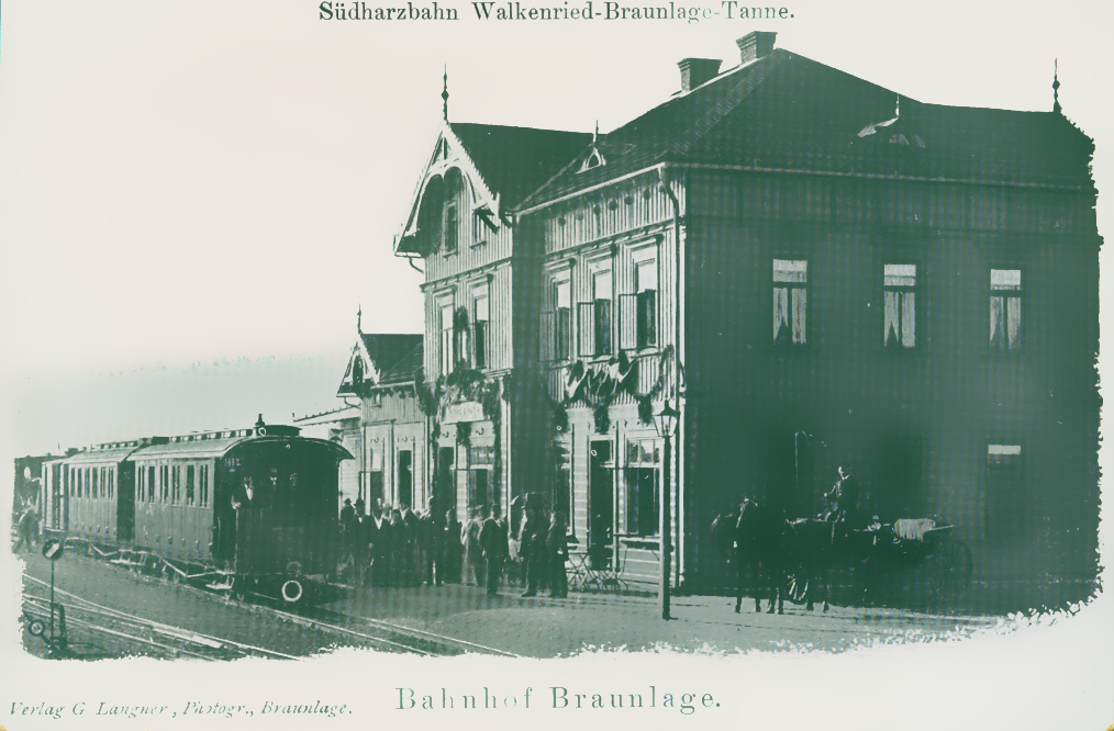 Postkarte von der Betriebseröffnung der Südharz-Eisenbahn 1899